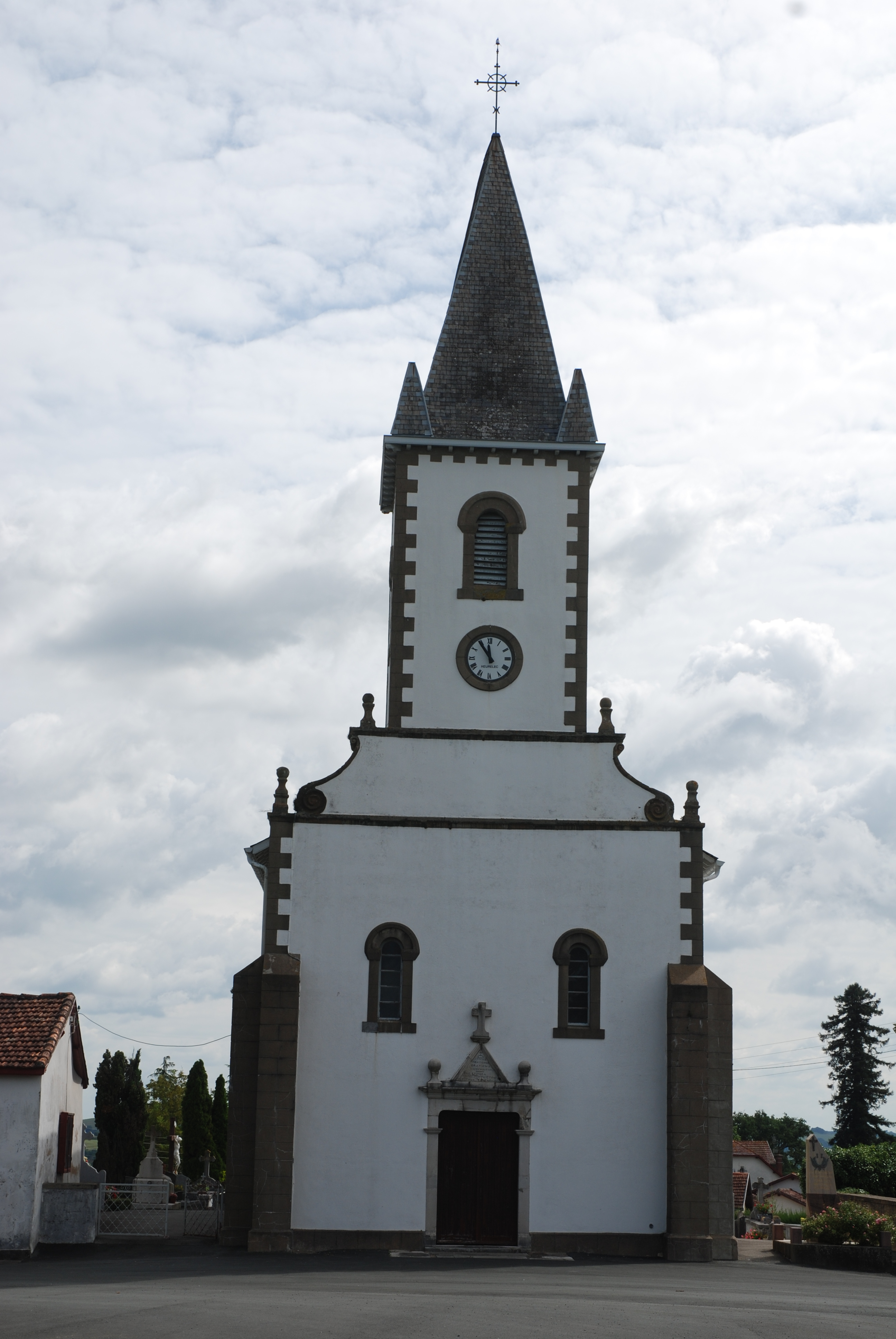 Masparraute, l'église Saint-Etienne